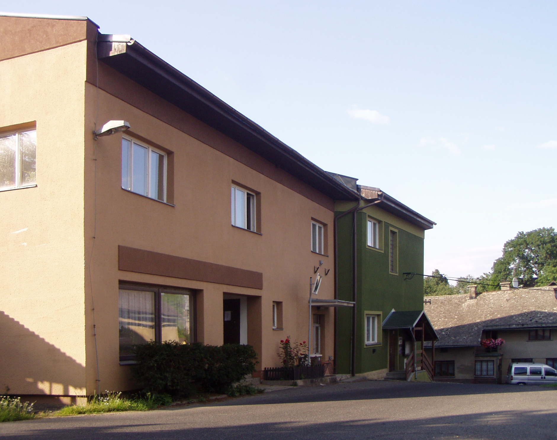 Víceúčelová budova v Lažanech, v zelené části sídlí obecní úřad